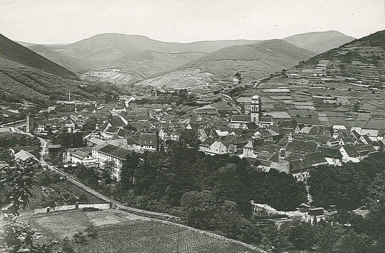 Vue aérienne de Kayersberg, photography